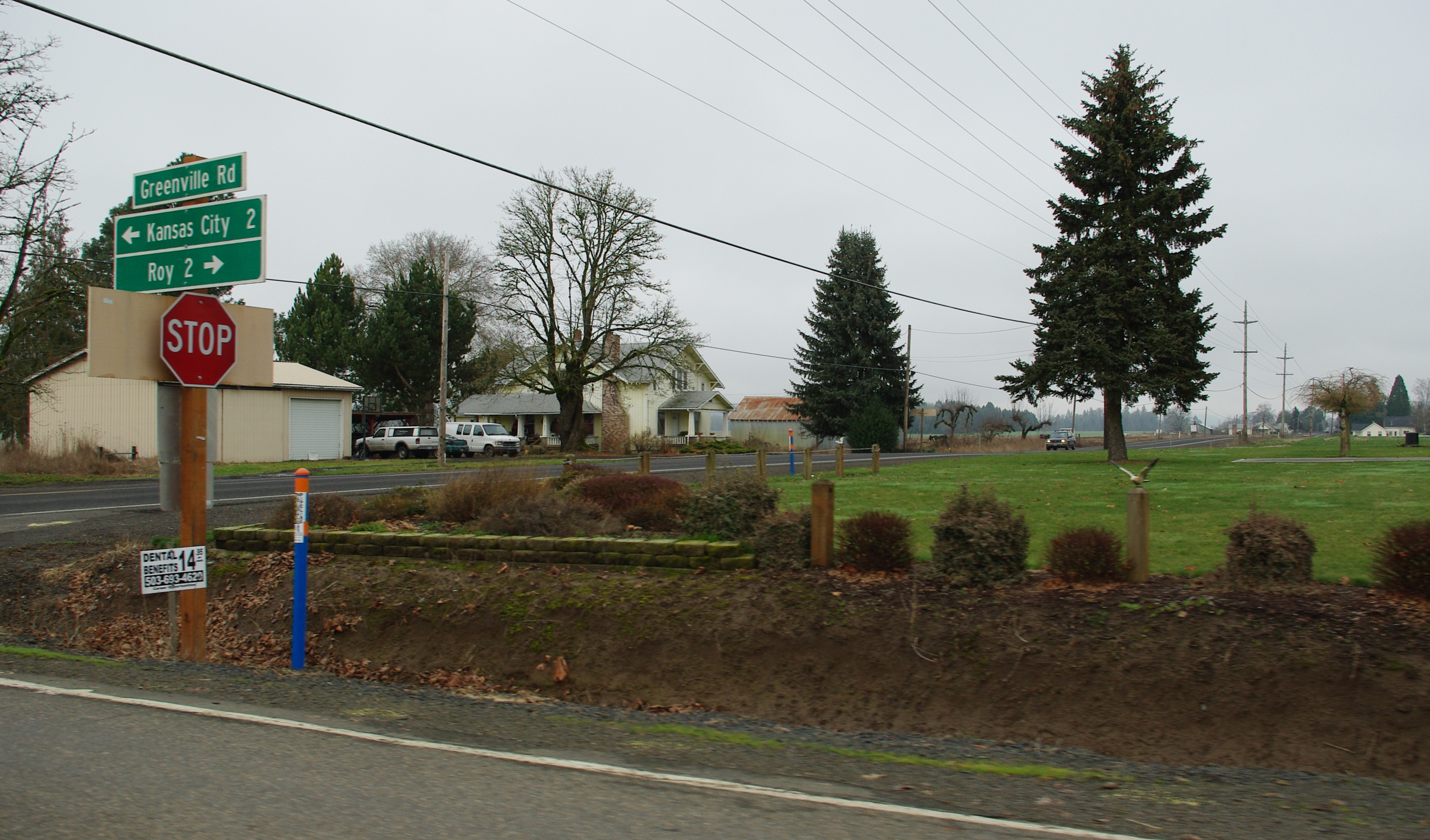 Greenville, Oregon.